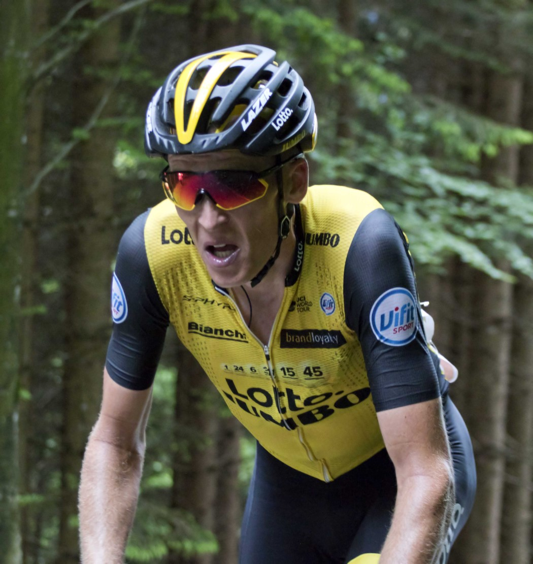 GIR10118 gesink